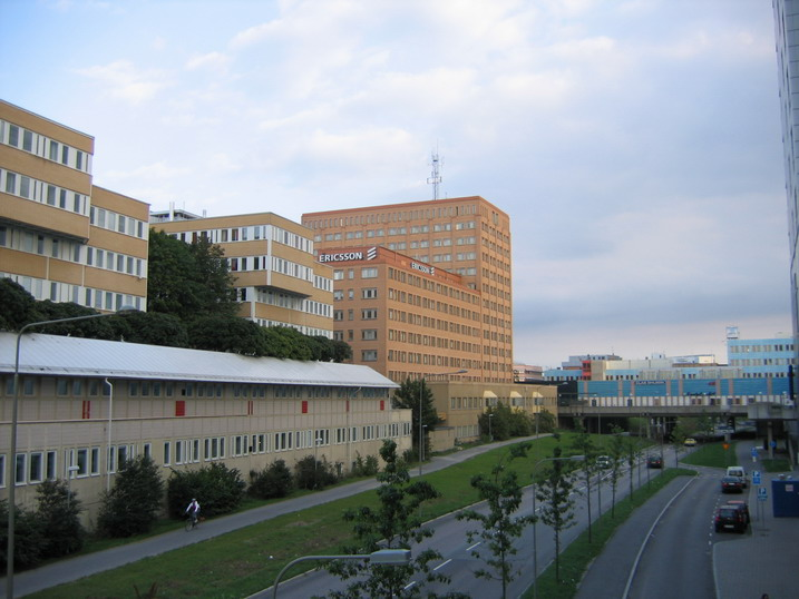 Kista, Stockholm, Sweden